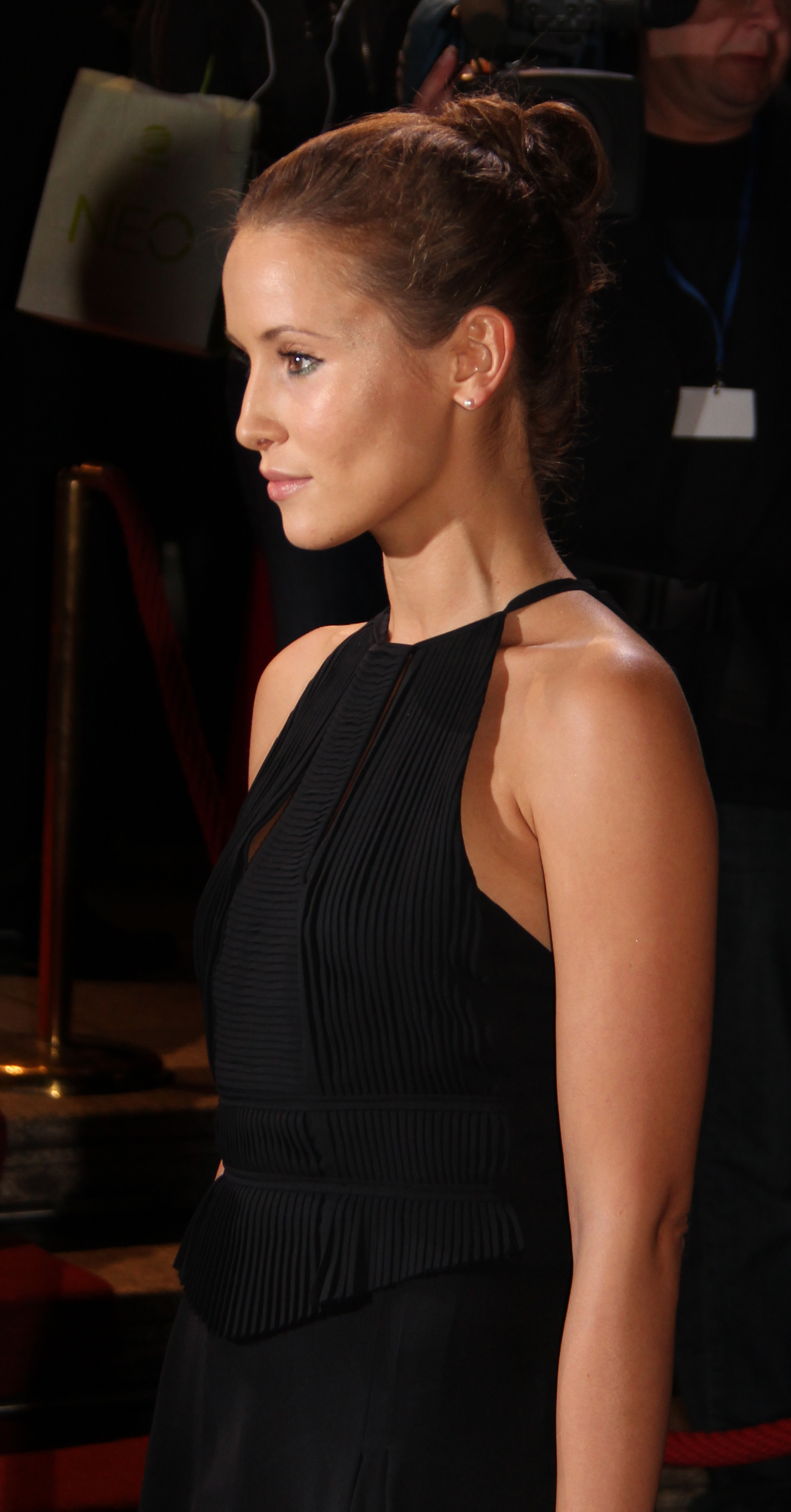 Peri Baumeister beim Hessischen Film- und Kinopreis 2012